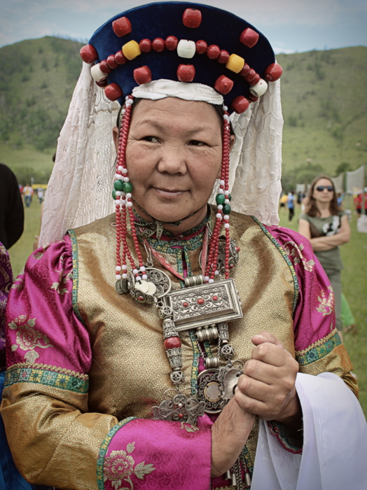 Сартульский фольклорный коллектив «Дэбэсэнэм» из села Алцак Джидинского района Бурятии